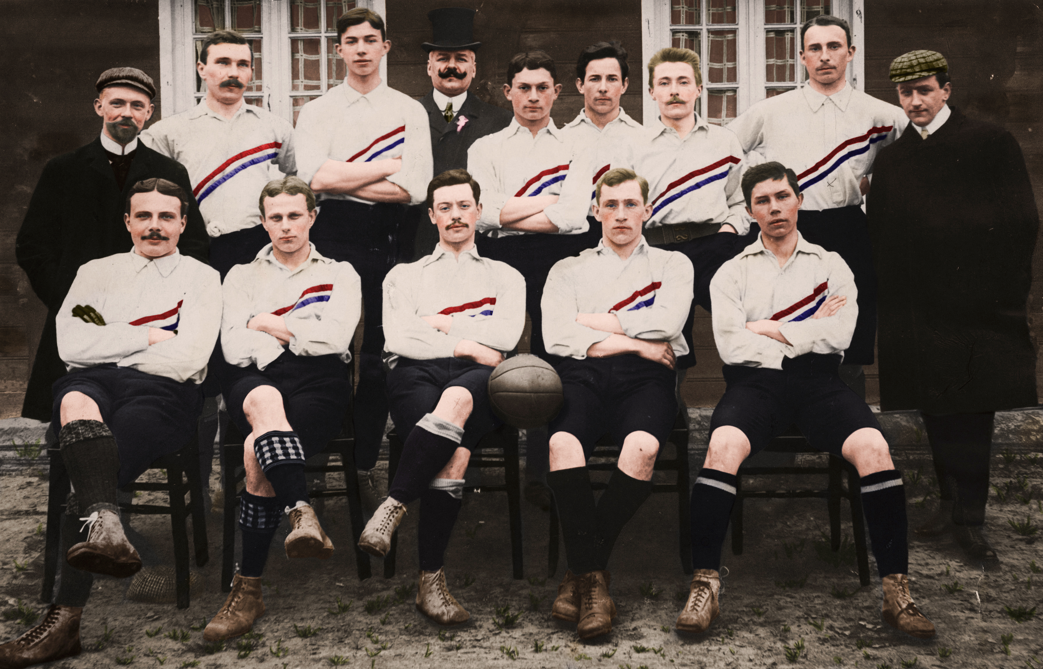 Foto van het Nederlands elftal voorafgaand aan zijn eerste interland, uit tegen België op 30 april 1905. Achterste rij: trainer Kees van Hasselt, Bok de Korver, Guus Lutjens, de Belgische official Paul Havenith, Ben Stom, Dolf Kessler, Peet Stol, Eddy de Neve, grensrechter Bep Willing. Voorste rij: Reinier Beeuwkes, Karel Gleenewinkel Kamperdijk, Rein Boomsma, Dirk Lotsy, Willy de Vos.